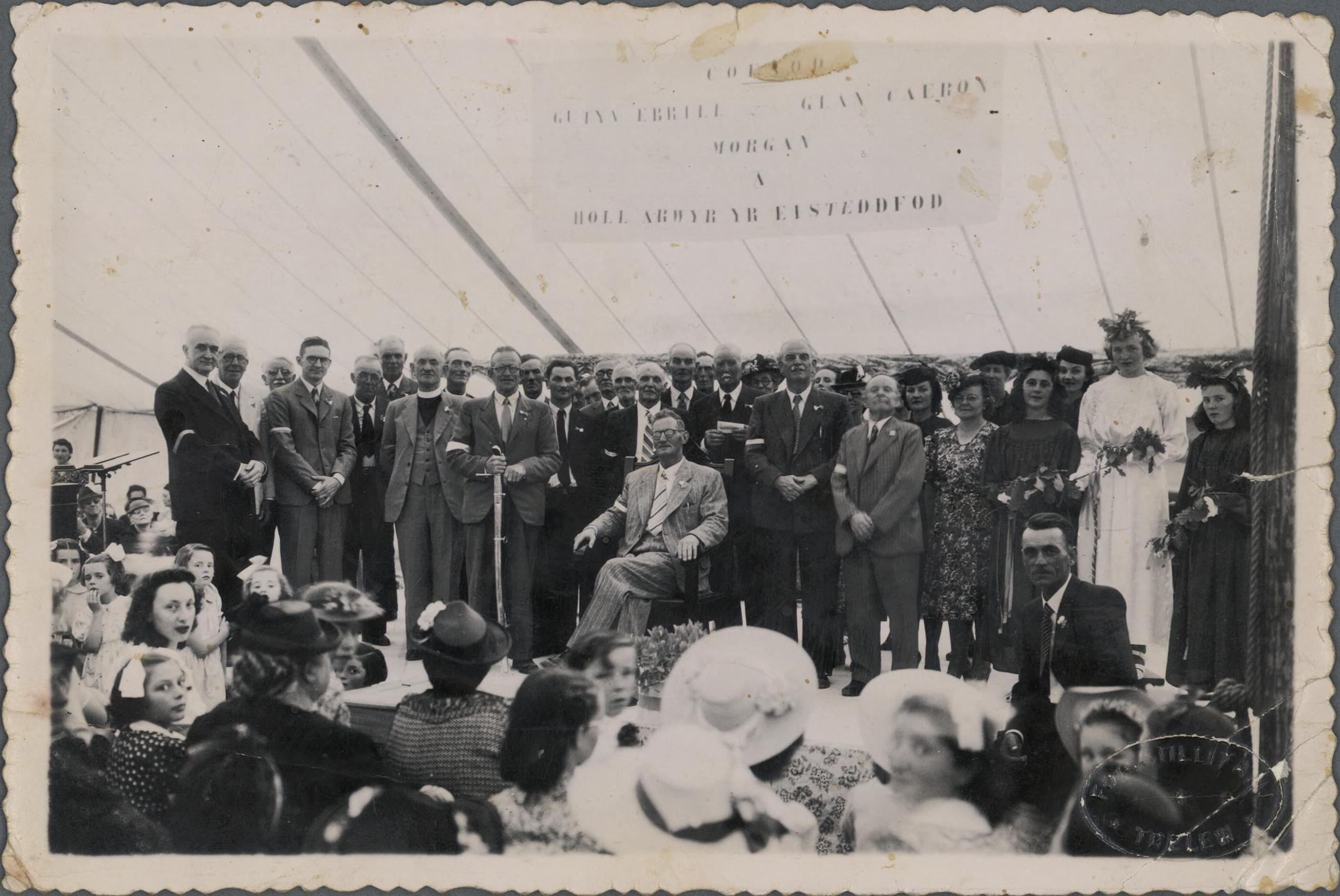 Seremoni cadeirio Morris ap Hughes, bardd buddugol eisteddfod y Wladfa, 1942